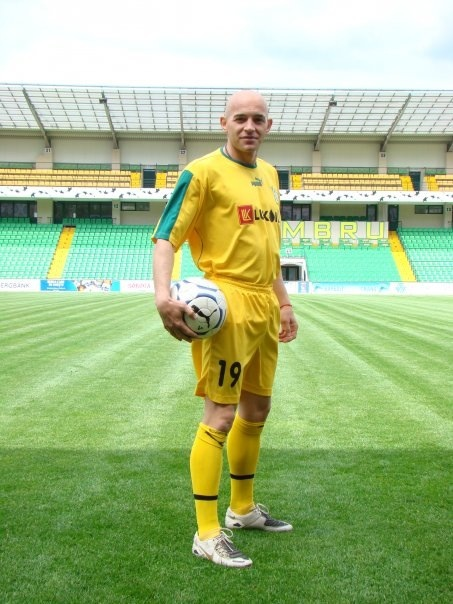 Simic Bojan